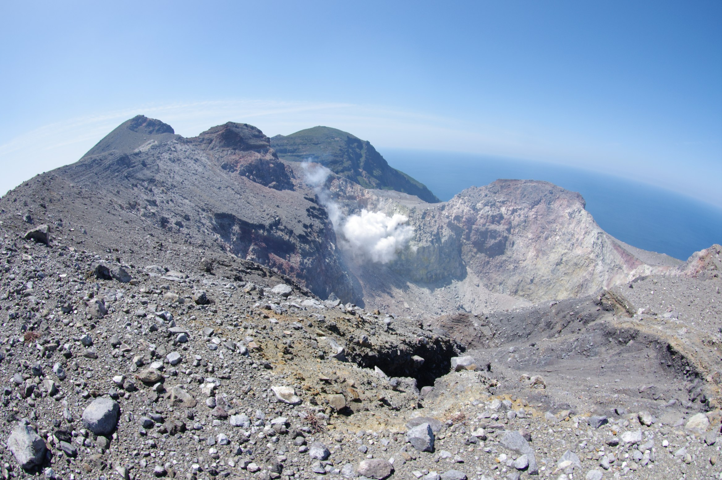 口永良部島、新岳火口(現役火口)。